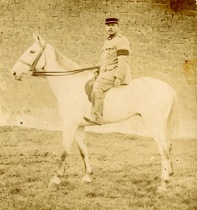 Photo ancienne du capitaine-vétérinaire Bucher de Chauvigné en uniforme, a cheval, vers 1920. Fondateur de la société des courses de Bressuire en 1921.